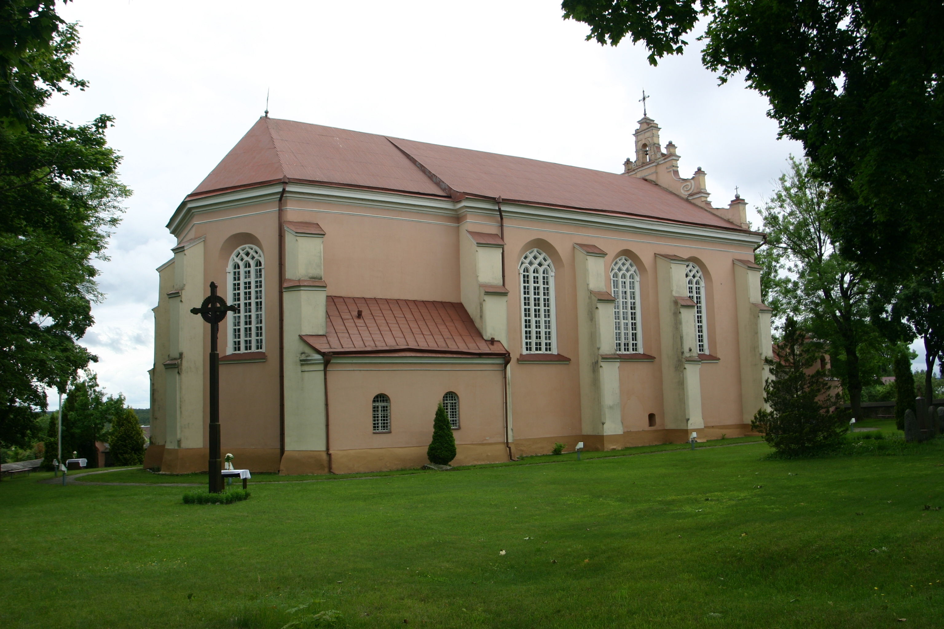 Merkinė, bažnyčia; church